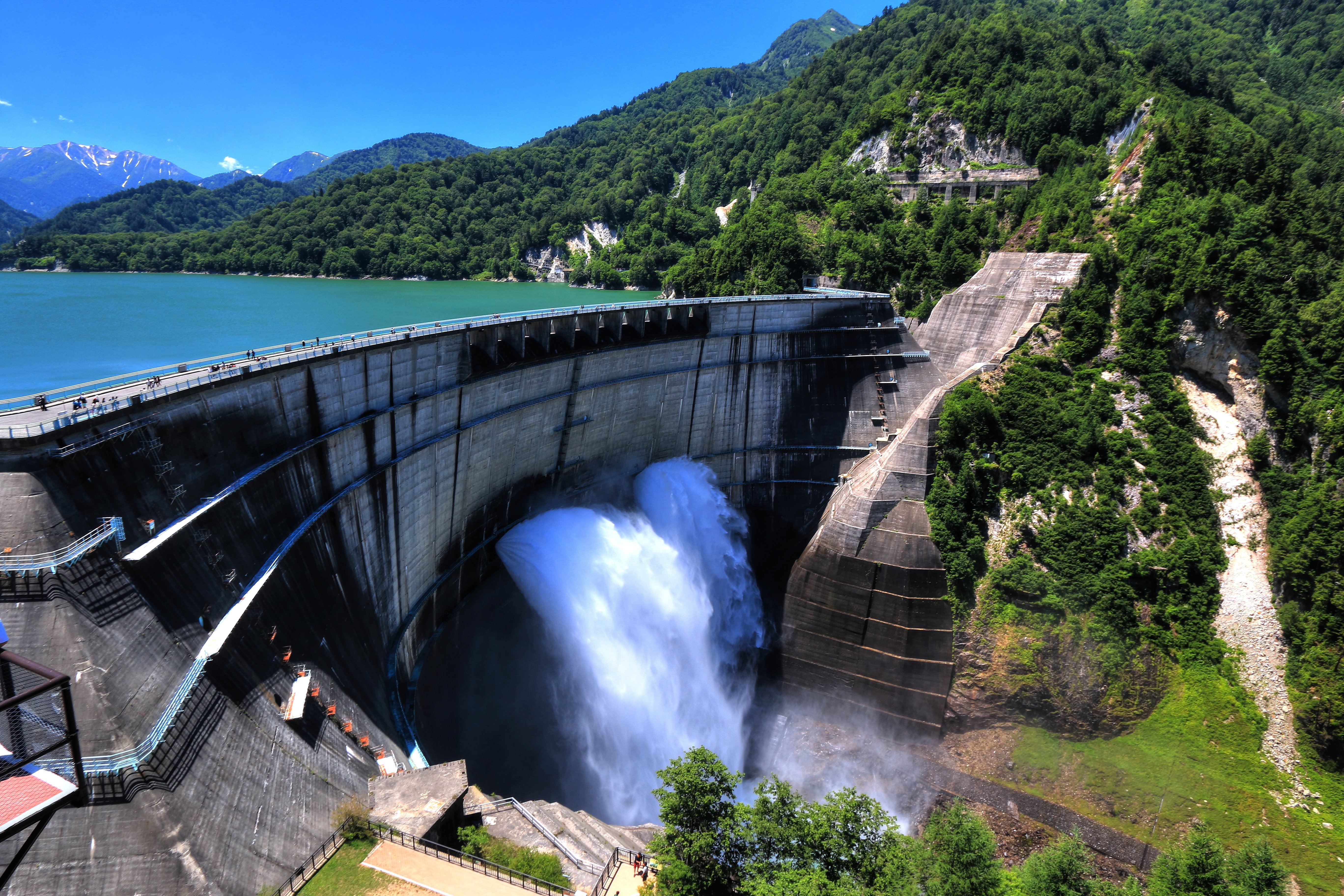 富山県中新川郡立山町、黒部ダム、立山黒部アルペンルート